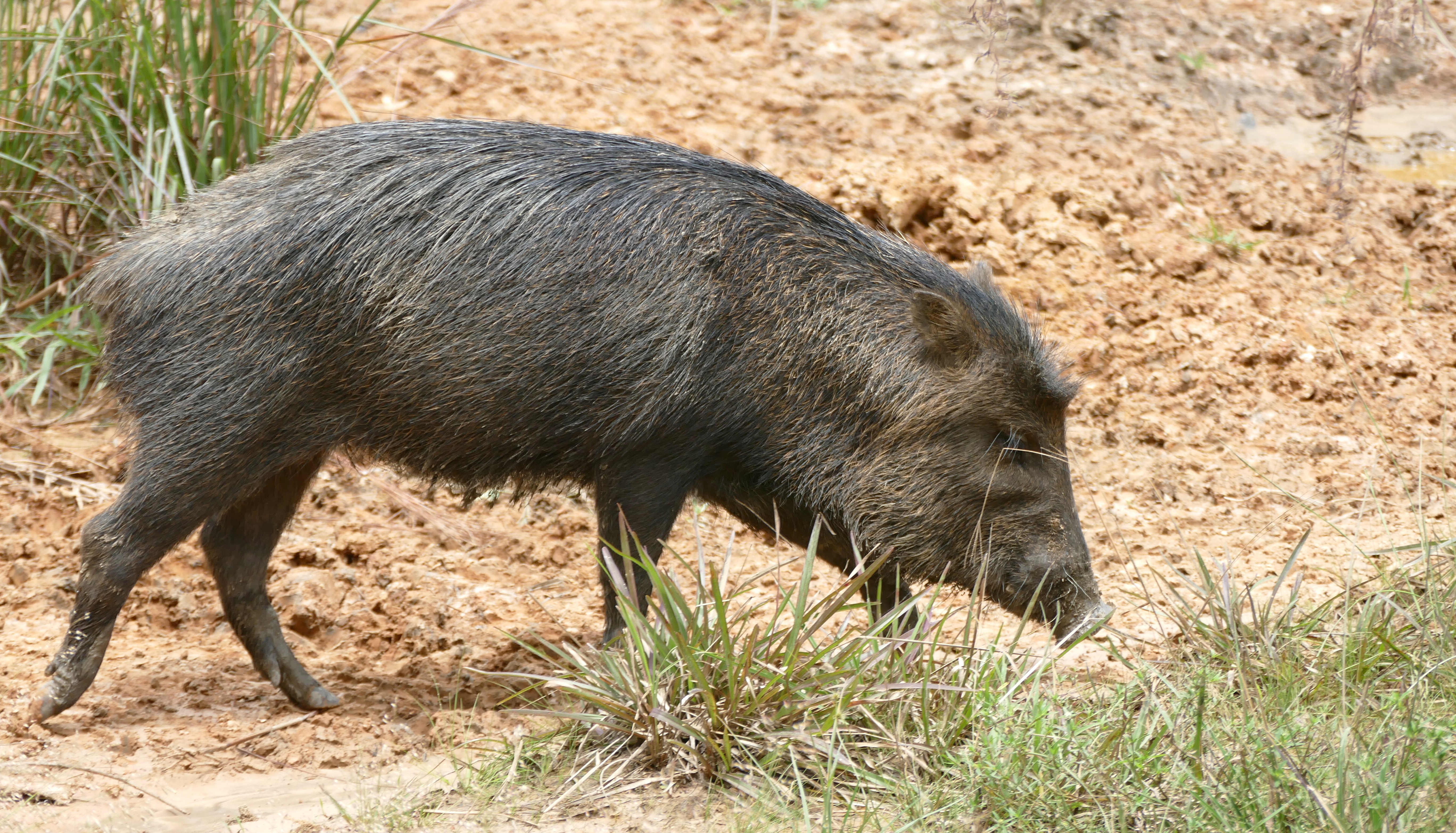 Zoo de Guyane, Macouria, French Guyana, FRANCE